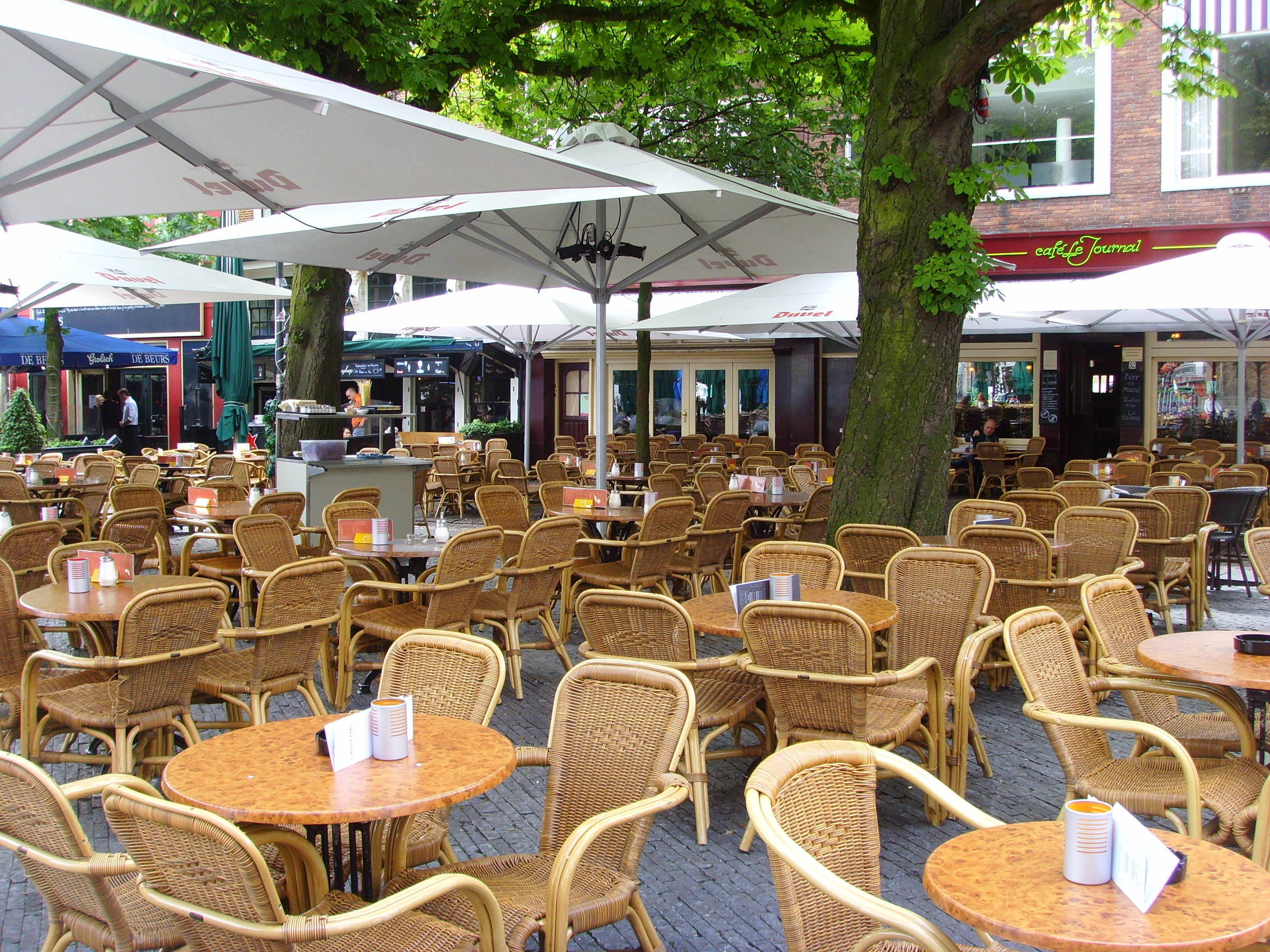 Terras aan de Neude in de binnenstad van Utrecht